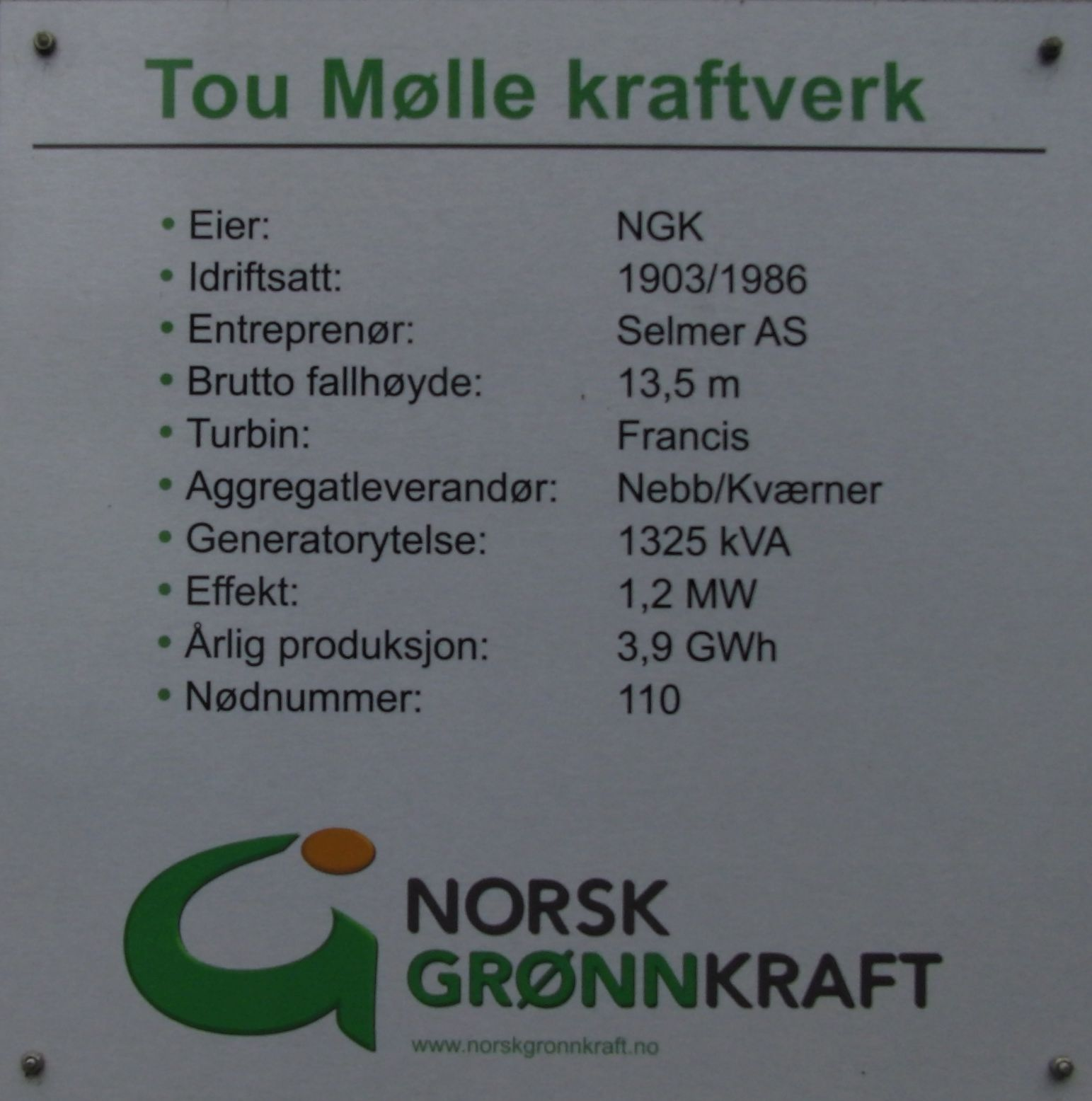 Tou Mølle kraftverk, informasjonsplakat på bygningen